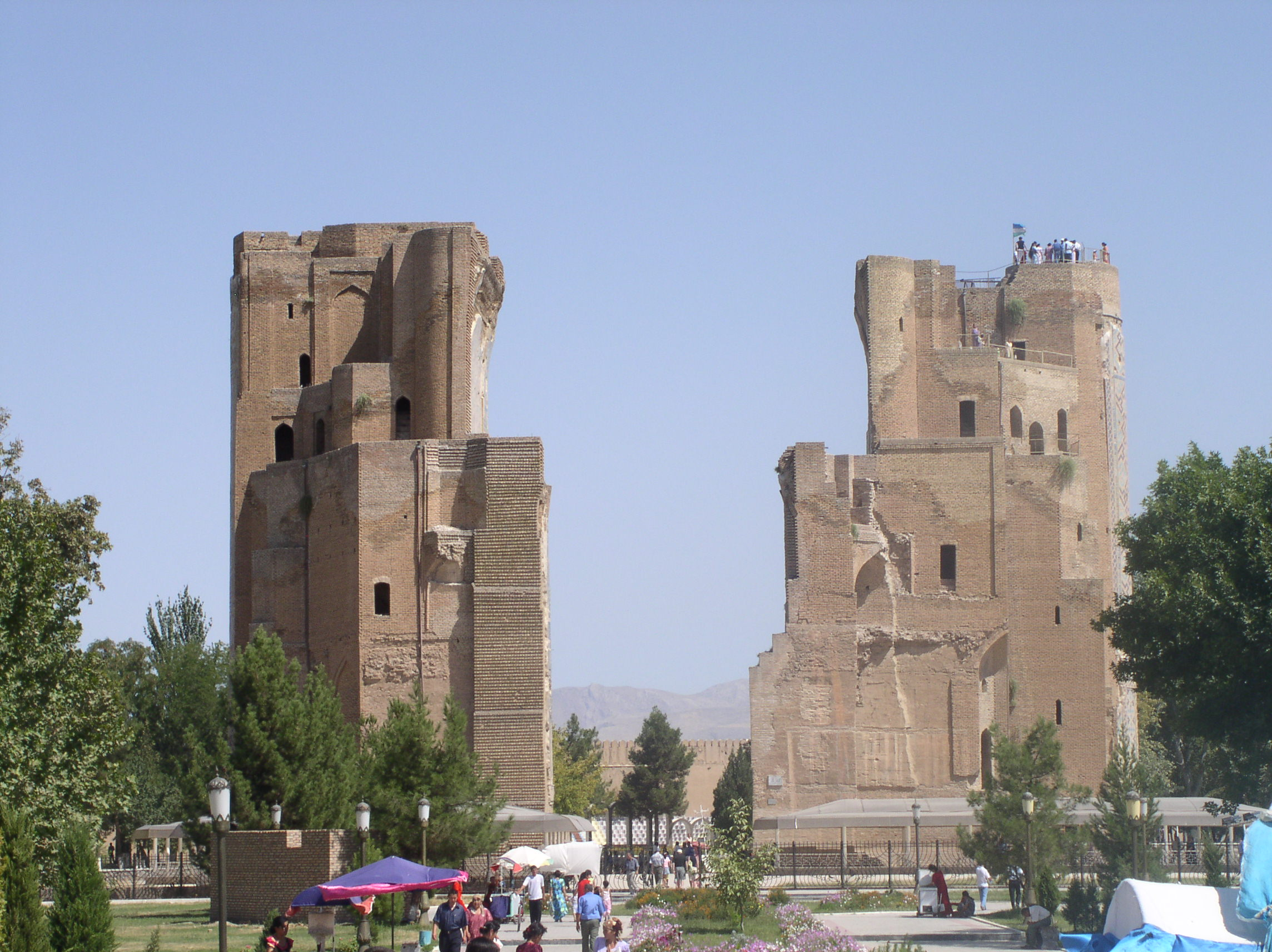 Aq-Saray palace in Shahrisabz